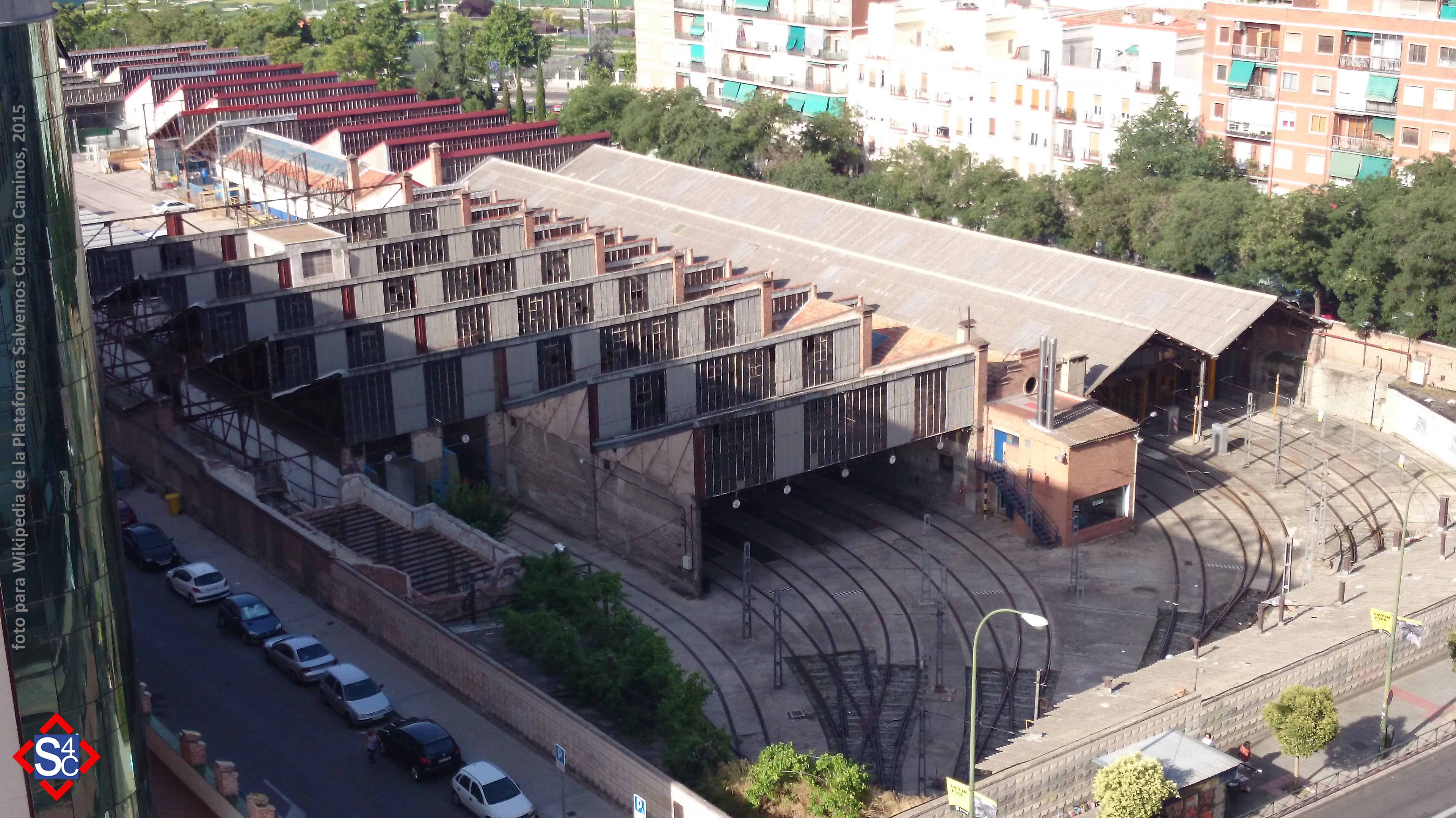 Vista de las naves en dientes de sierra que construyó la Compañía Metropolitana Alfonso XIII en 1918-19 para talleres y cocheras de la primera línea de Metro de Madrid. Inauguradas el 17 de Octubre de 1919